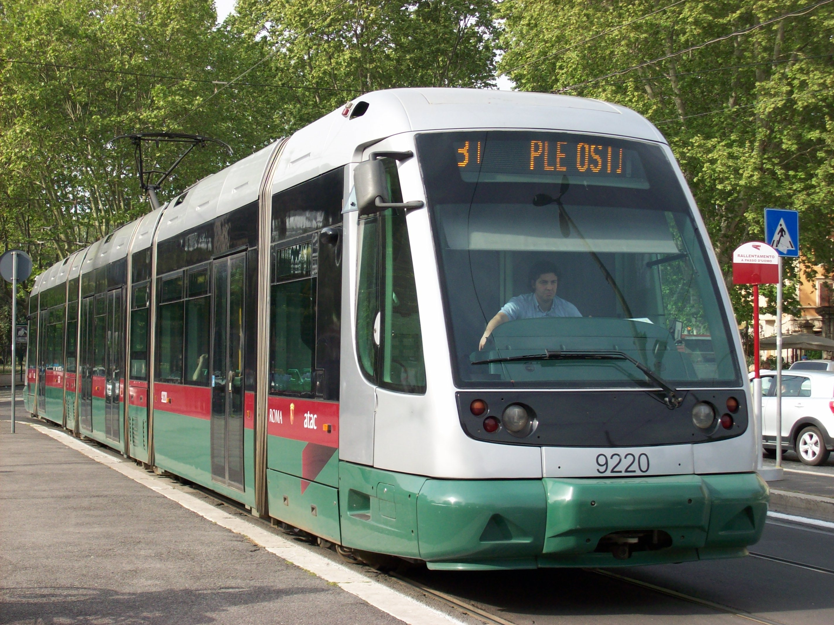 An ATAC 9200 tram in Rome at Piazza di Porta San Paolo, Rome.